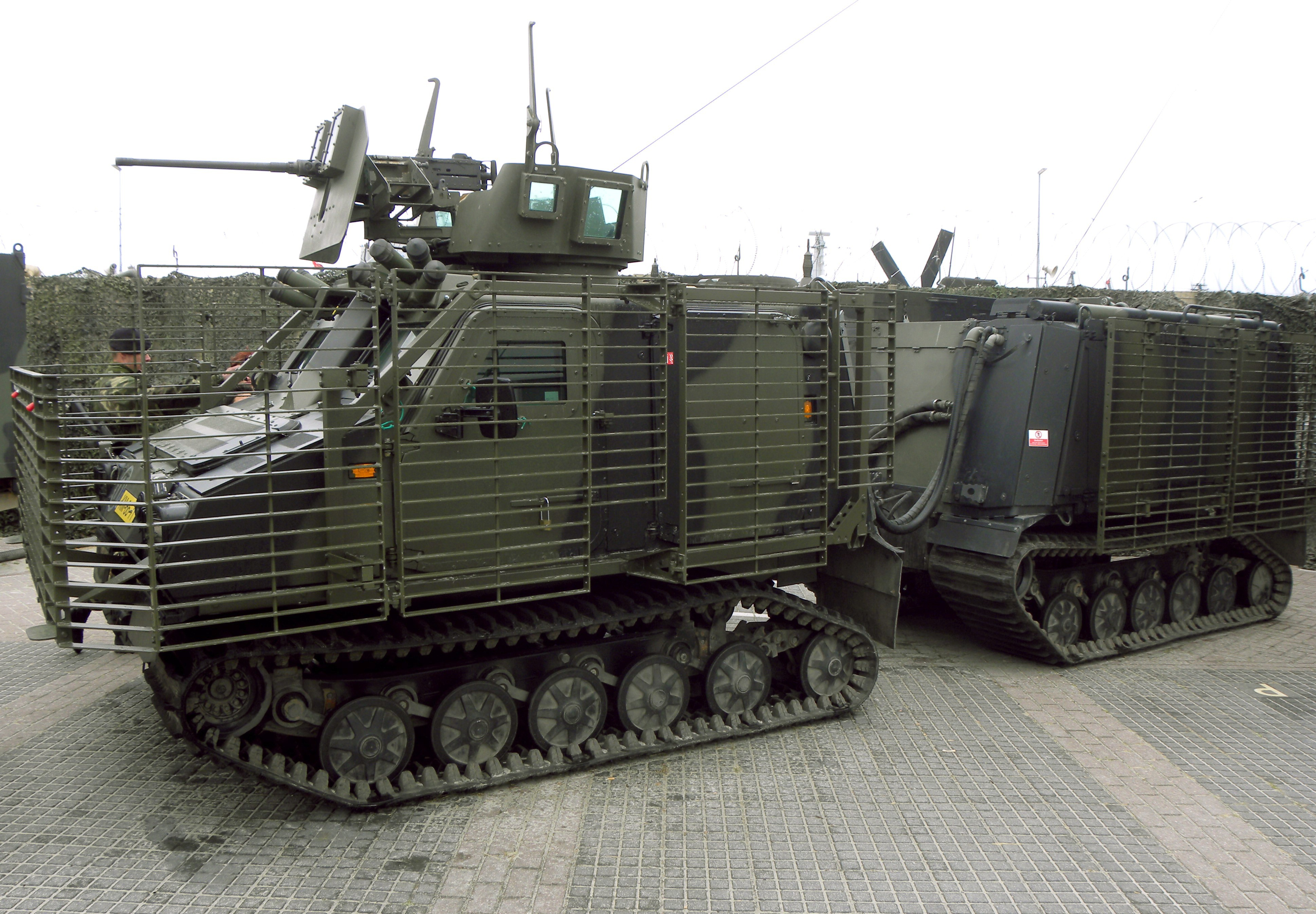 Hägglunds BvS10 der Korps Mariniers der niederländischen Marine